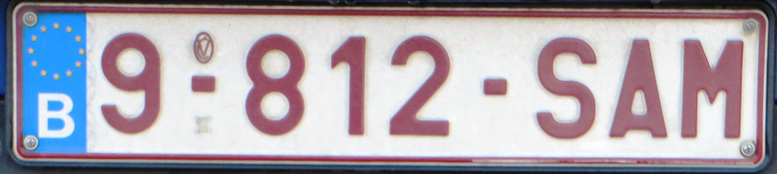 Plaat België met 9